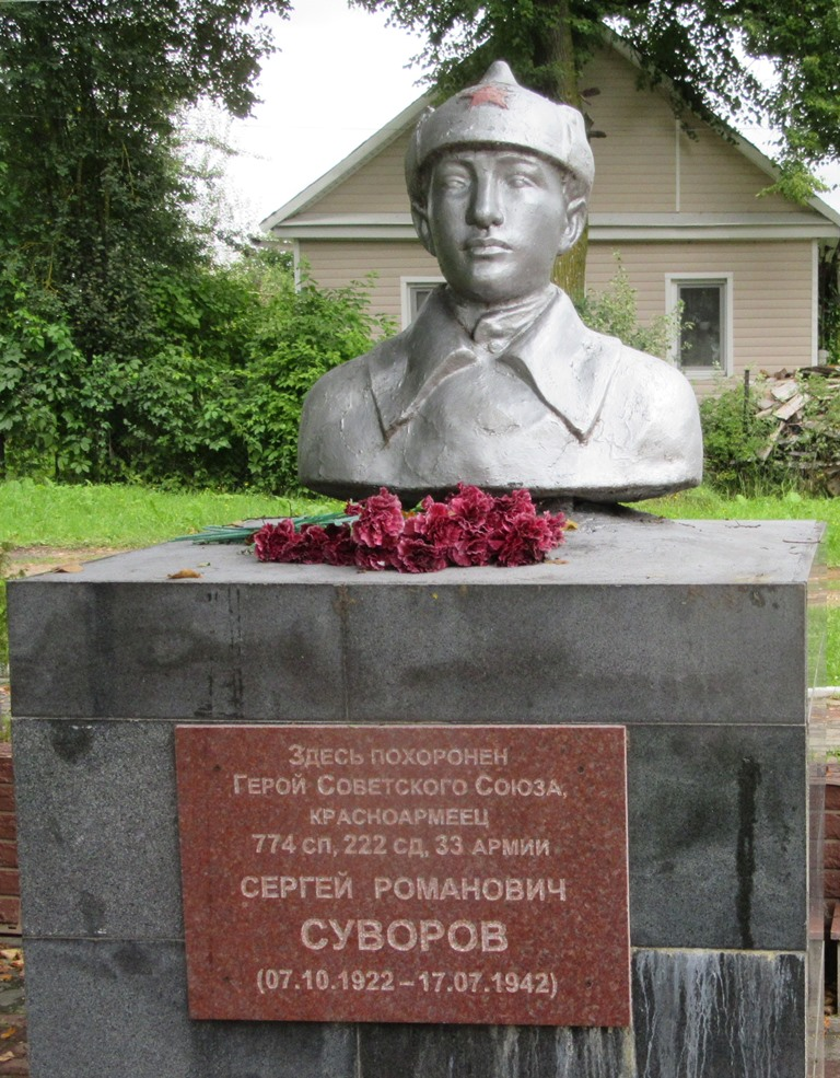 Памятник Герою Советского Союза в селе Износки